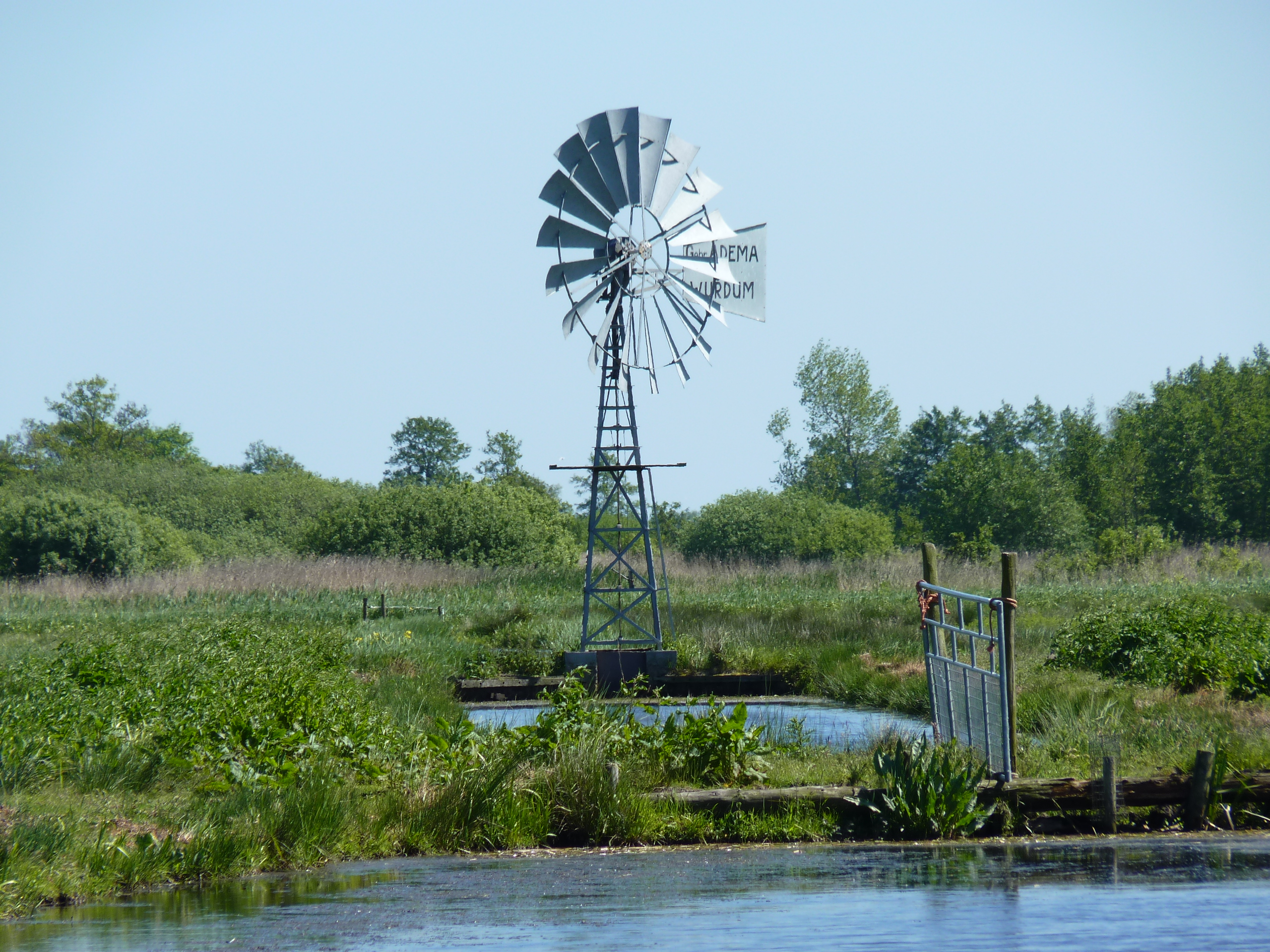 Eernewoude Windmotor Saiterpetten